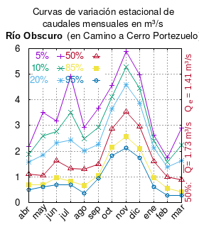 Curvas de variación estacional del río Obscuro en Camino a Cerro Portezuelo. # Dirección General de Aguas # Diagnóstico y clasificación de los cursos y cuerpos de agua según objetivos de calidad. Cuenca del río Aysén. # Santiago de Chile # Ministerio de Obras Públicas (Chile) # 2004 # url: # urlarchivo: # Tabla 4.4: Estación Oscuro en camino a cerro Portezuelo, pág. 52 mes 5% 10% 20% 50% 85% 95% abr 2.18 1.88 1.58 1.11 0.70 0.51 may 3.52 2.59 1.84 1.06 0.69 0.60 jun 3.17 2.77 2.33 1.62 0.97 0.68 jul 4.93 3.52 2.42 1.32 0.82 0.70 ago 2.94 2.49 2.01 1.29 0.66 0.37 sep 3.67 2.92 2.27 1.50 1.06 0.93 oct 4.55 4.11 3.64 2.88 2.16 1.83 nov 5.90 5.27 4.59 3.53 2.56 2.12 dic 4.99 4.44 3.86 2.95 2.11 1.74 ene 2.62 2.40 2.13 1.61 0.98 0.61 feb 1.73 1.57 1.37 1.00 0.55 0.28 mar 2.89 2.23 1.62 0.89 0.42 0.27 This plot was created with Gnuplot.